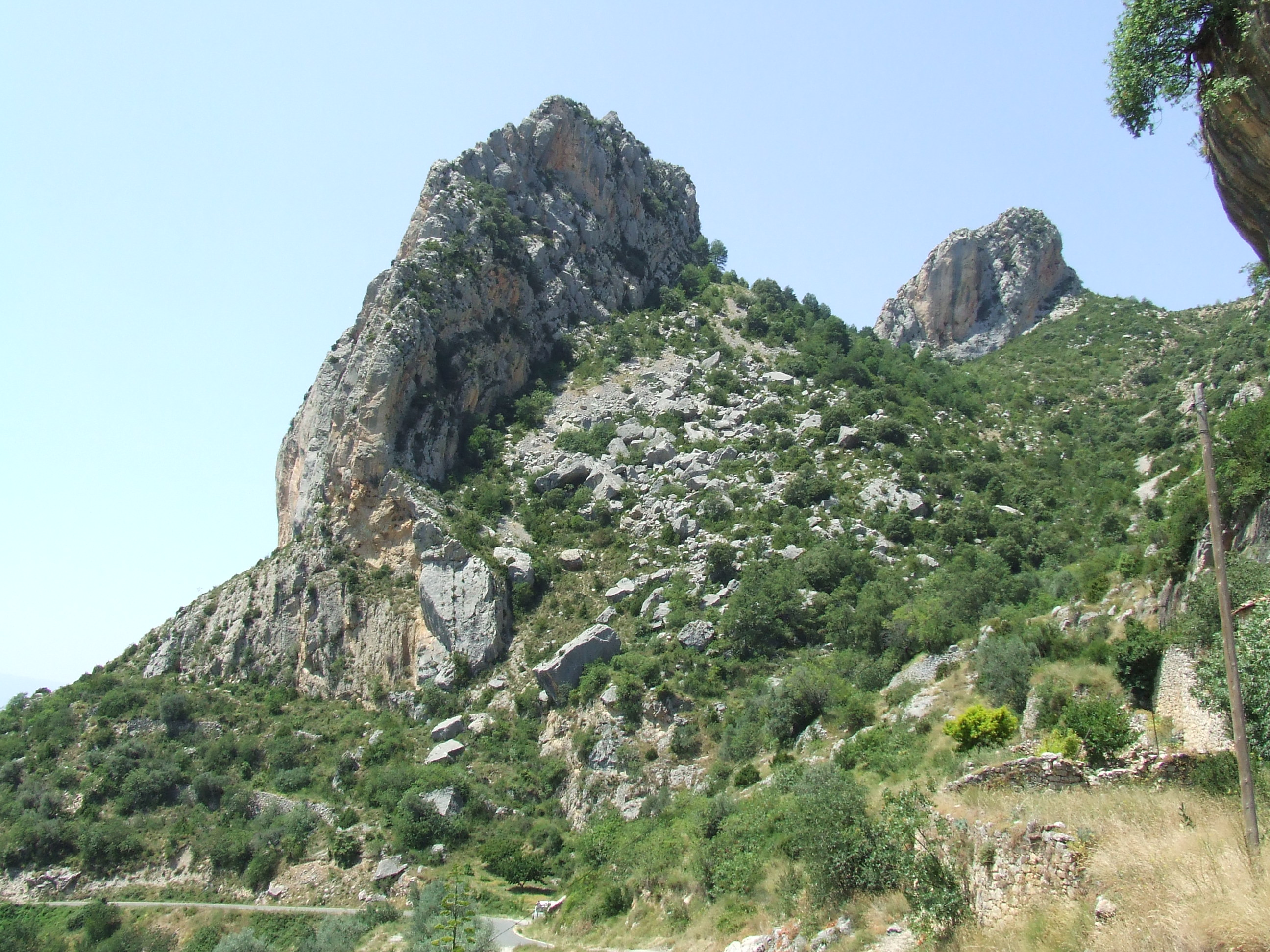 Los Clotassos (Abella de la Conca, Pallars Jussà)